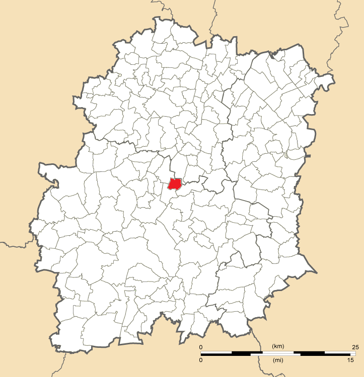 Carte de position de Torfou en Essonne (91)